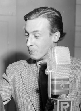 Peter Alexander im Studio des Senders Rot-Weiß-Rot